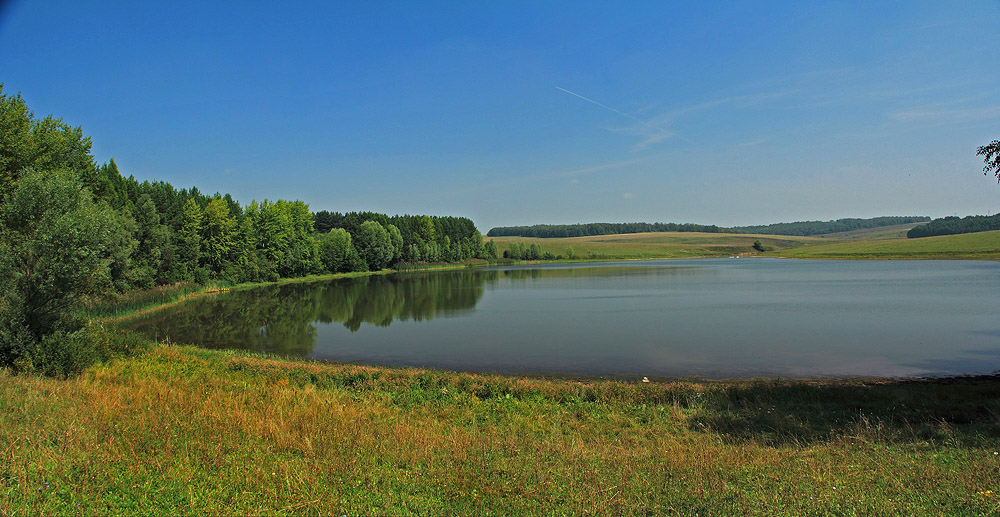 Озеро Сюткюль: В 14 км юго-западнее районного центра Моргауши, на южной окраине д.Сюткюль, Моргаушский район, This image is related to the protected area of Russia number 2110036